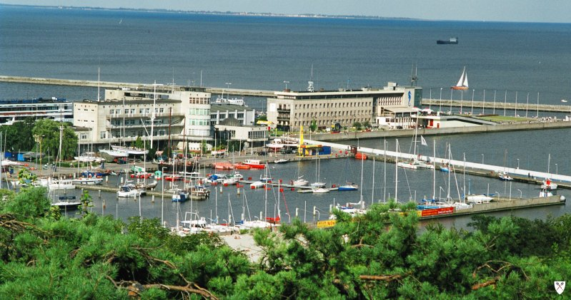 Port jachtowy i Skwer Kościuszki w Gdyni.